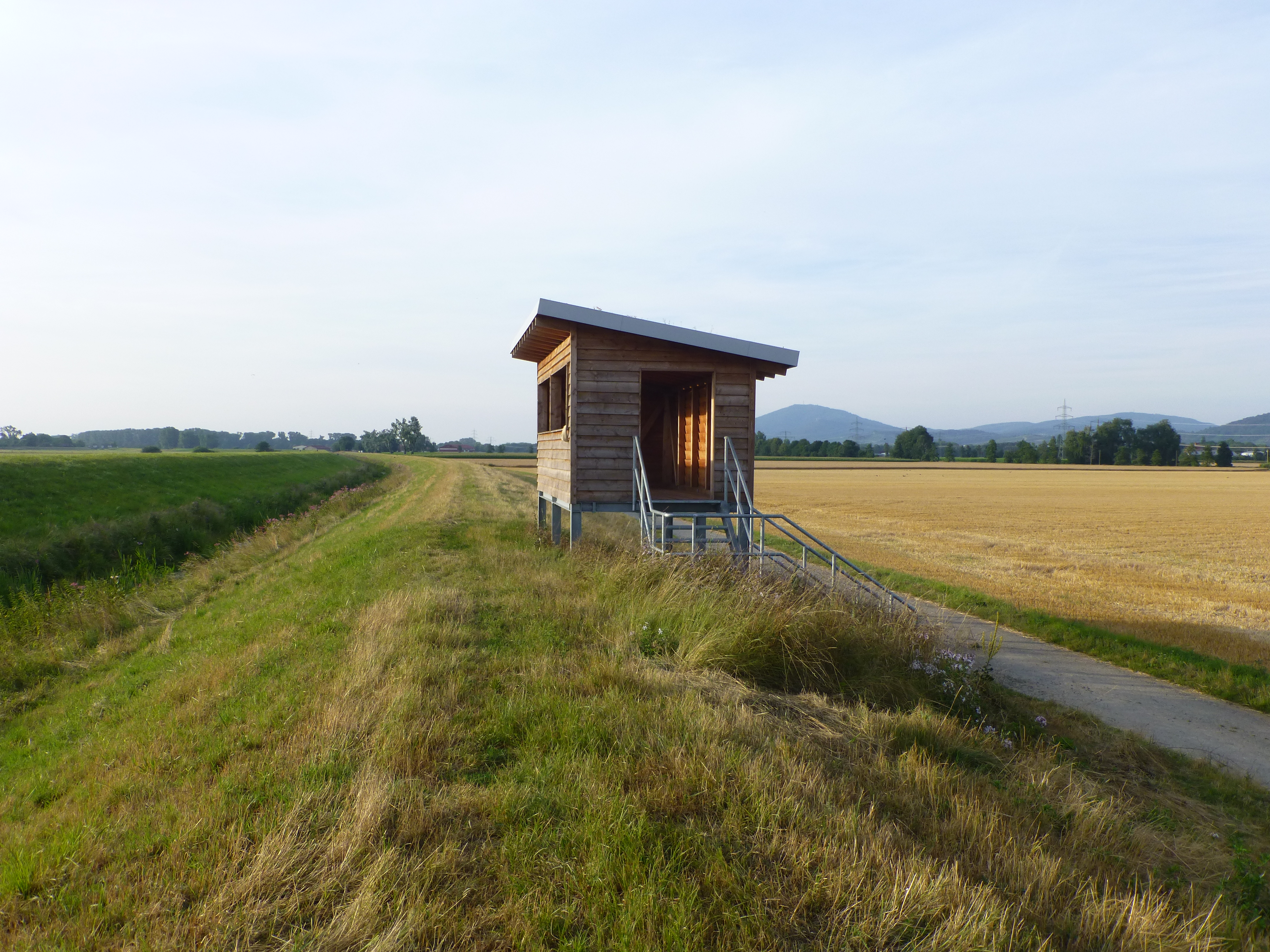 Aussichtsplattform am Ostrand der Weschnitzinsel bei Heppenheim an der Bergstraße